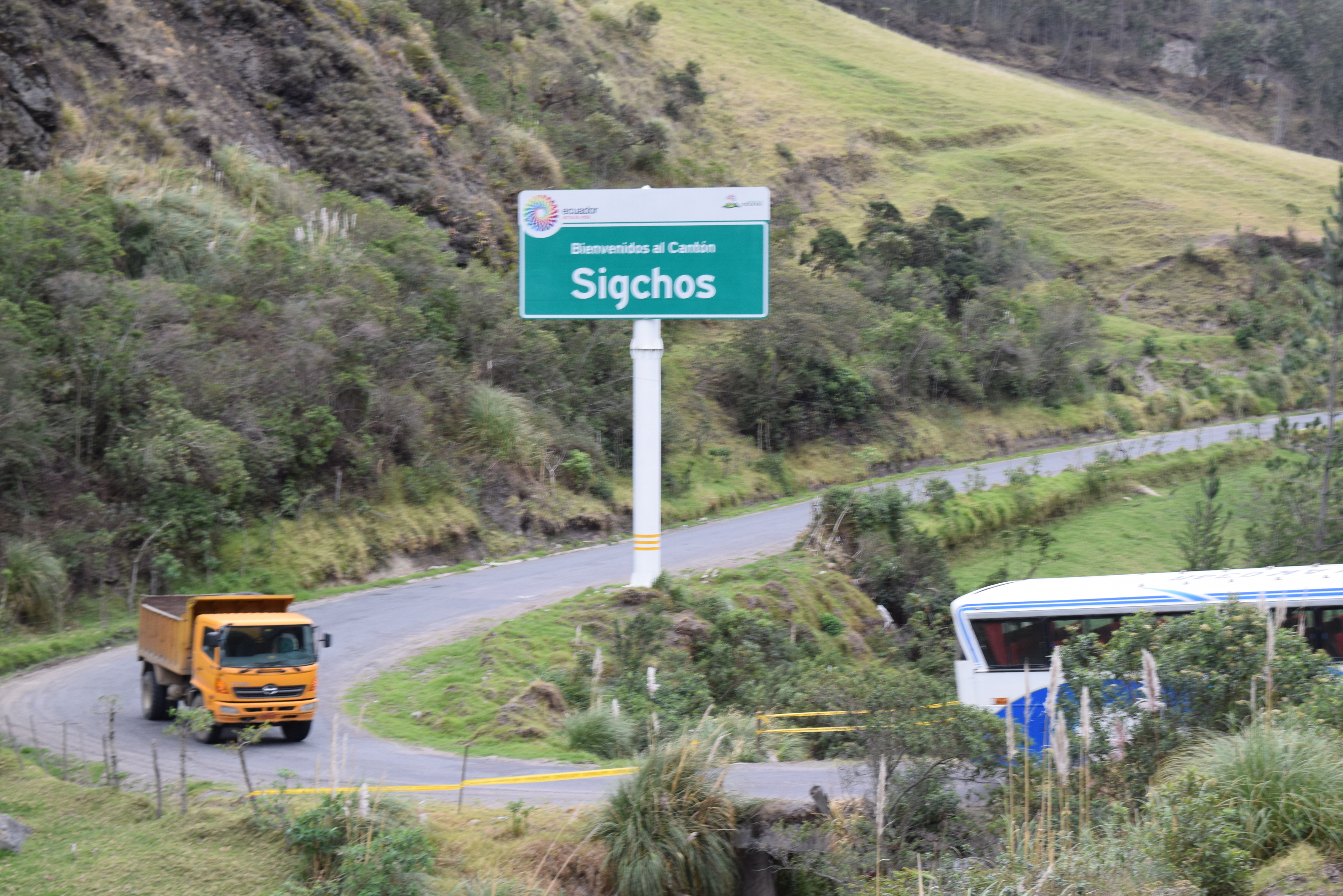 Sigchos